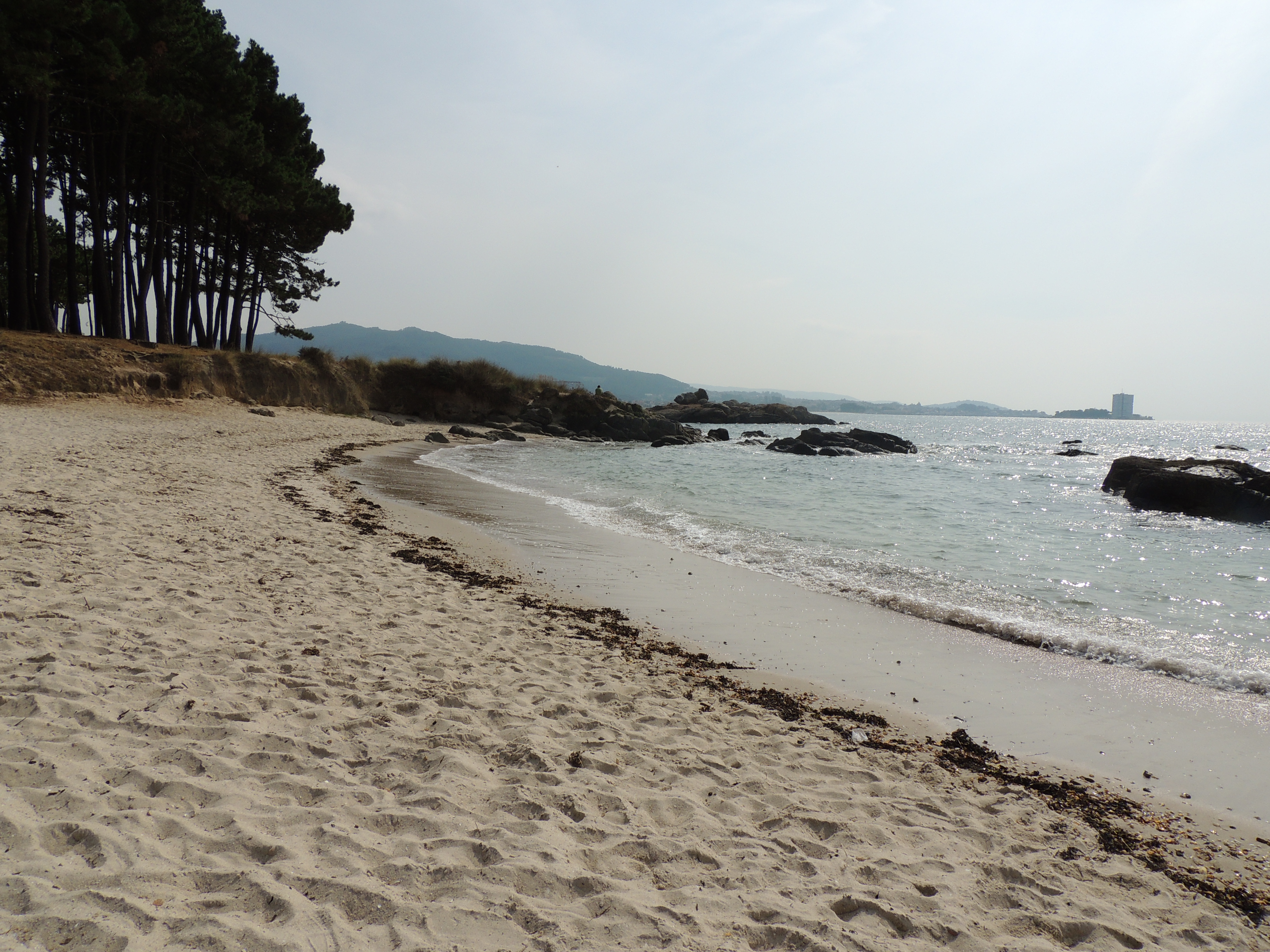 praia Mourisca